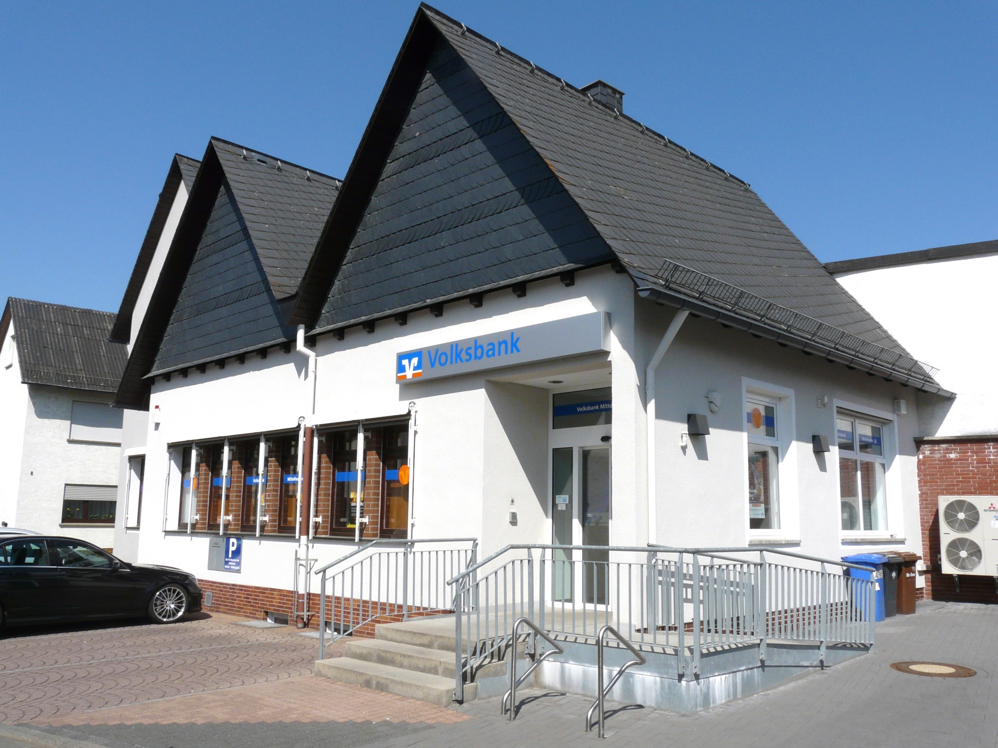 Eine Geschäftsstelle der Volksbank Mittelhessen in Wetzlar-Naunheim, Lahn-Dill-Kreis